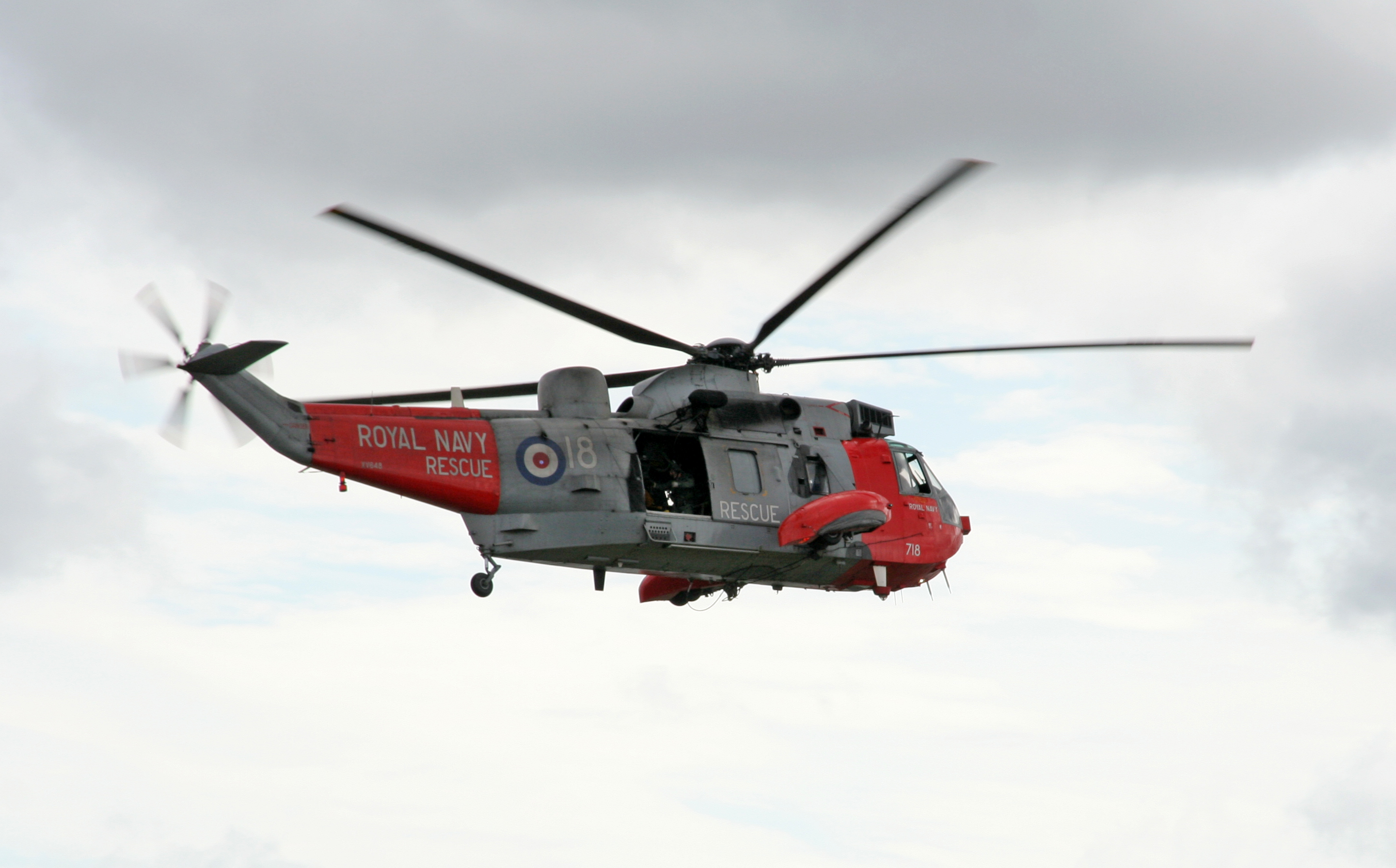 Sea King 3